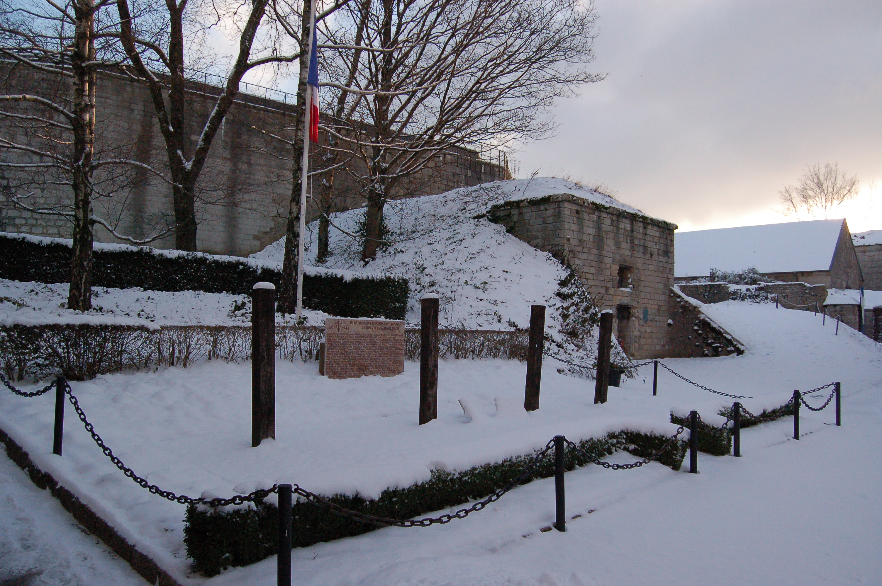 Poteaux des Fusillers